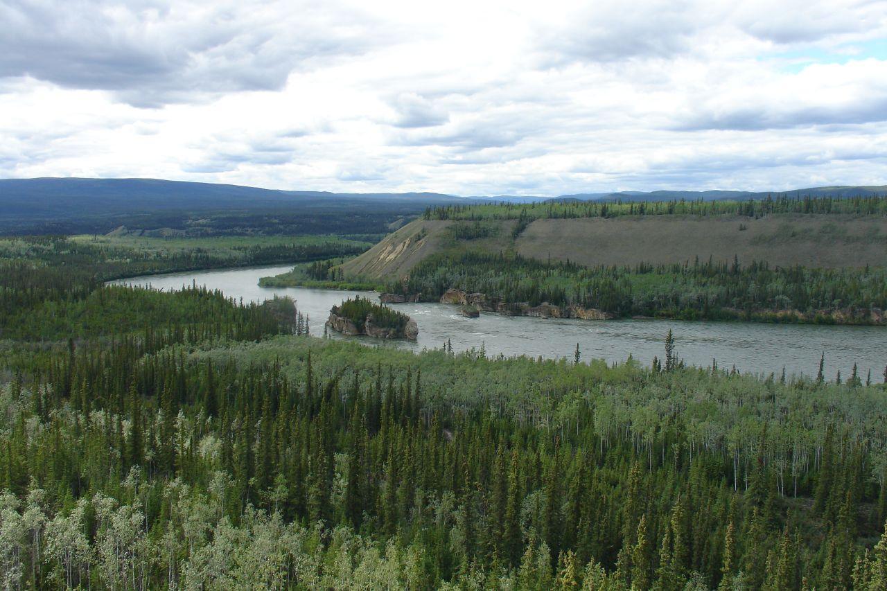 Five Finger Rapids, Yukon River